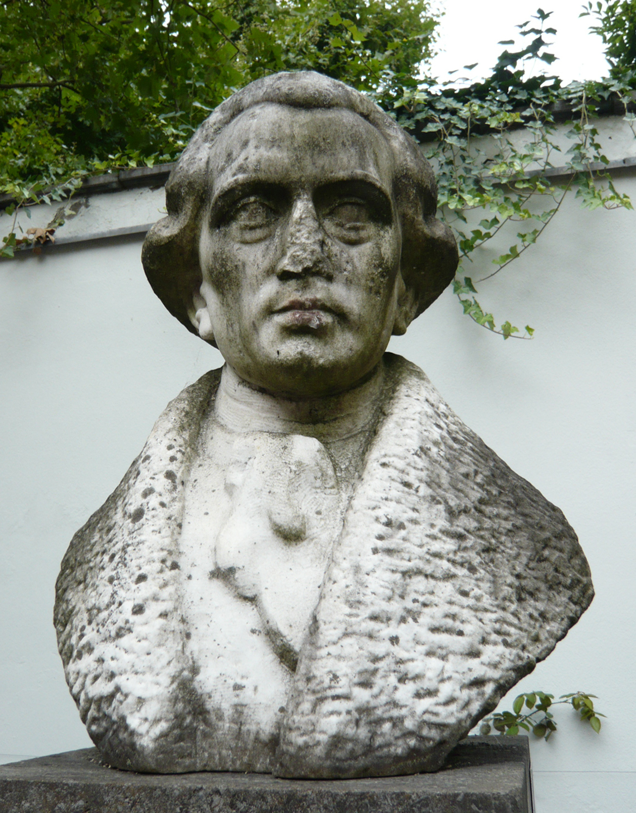 Büste Friedrich Heinrich Jacobi (* 25. Januar 1743 in Düsseldorf; † 10. März 1819 in München); deutscher Philosoph, Jurist, Kaufmann und Schriftsteller. Bildhauer Emil Jungblut (* 11. Juni 1888 in Düsseldorf; † 24. April 1955 ebenda), Eingangsbereich Malkasten-Haus zum Malkastenpark, Jacobistraße 6a, Düsseldorf-Pempelfort